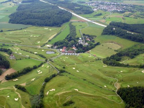 Luftaufnahme vom Golfpark Winnerod.